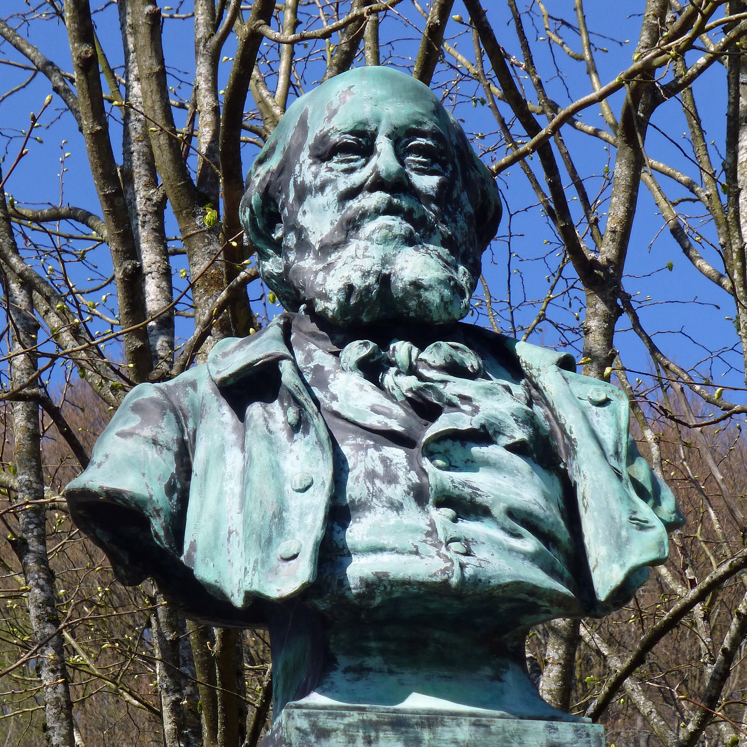 Plombières-les-Bains (Vosges) : monument en bronze dédié au peintre Louis Français. Sculpteur Emile Edmond Peynot (1850-1932)